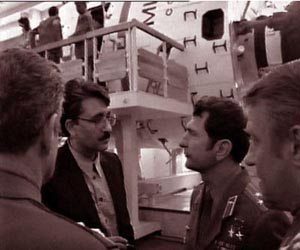 ایستگاه میر